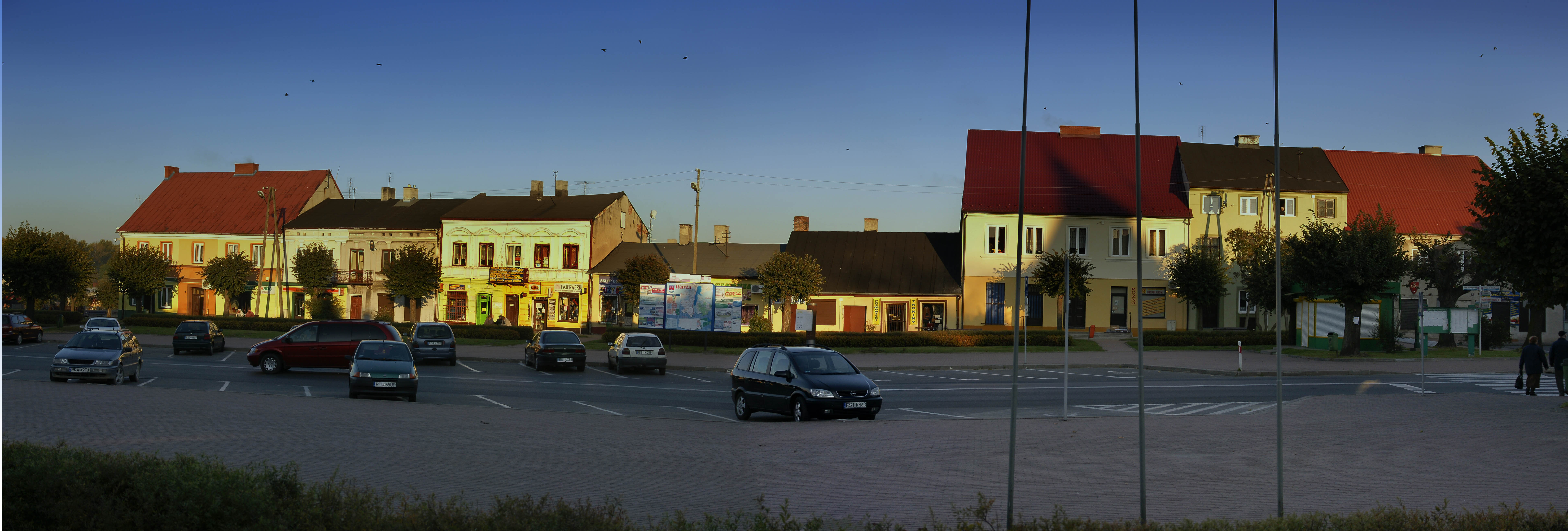 Warta rynek